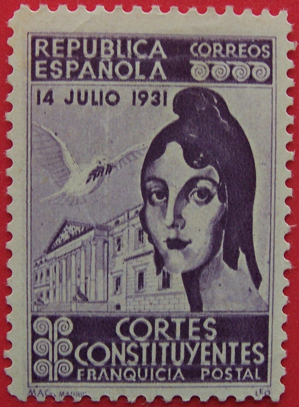 Sello conmemorativo de la apertura de las Cortes Constituyentes, franquicia postal, República Española, 1931